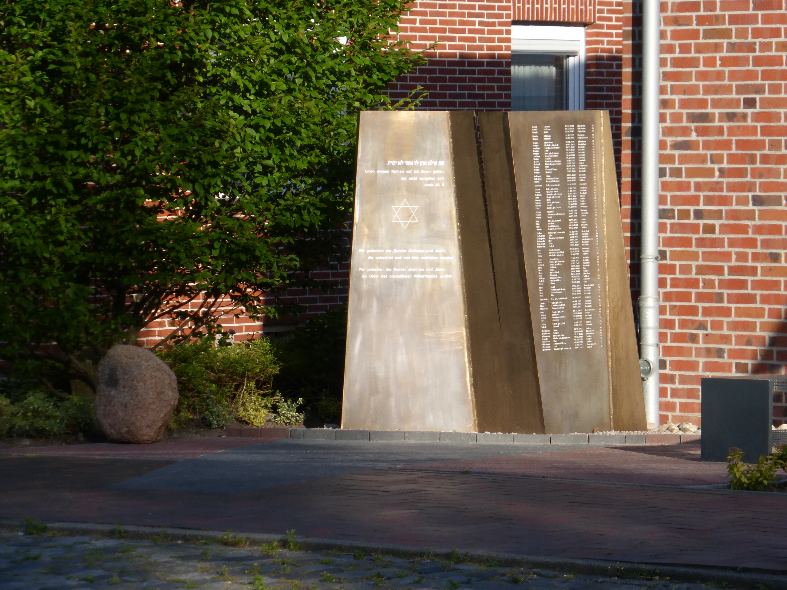 Jüdisches Mahnmal in Bunde, Landkreis Leer, Niedersachsen, Deutschland